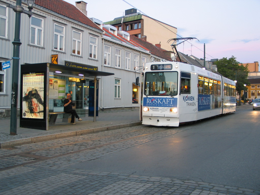 Tram in Trondheim